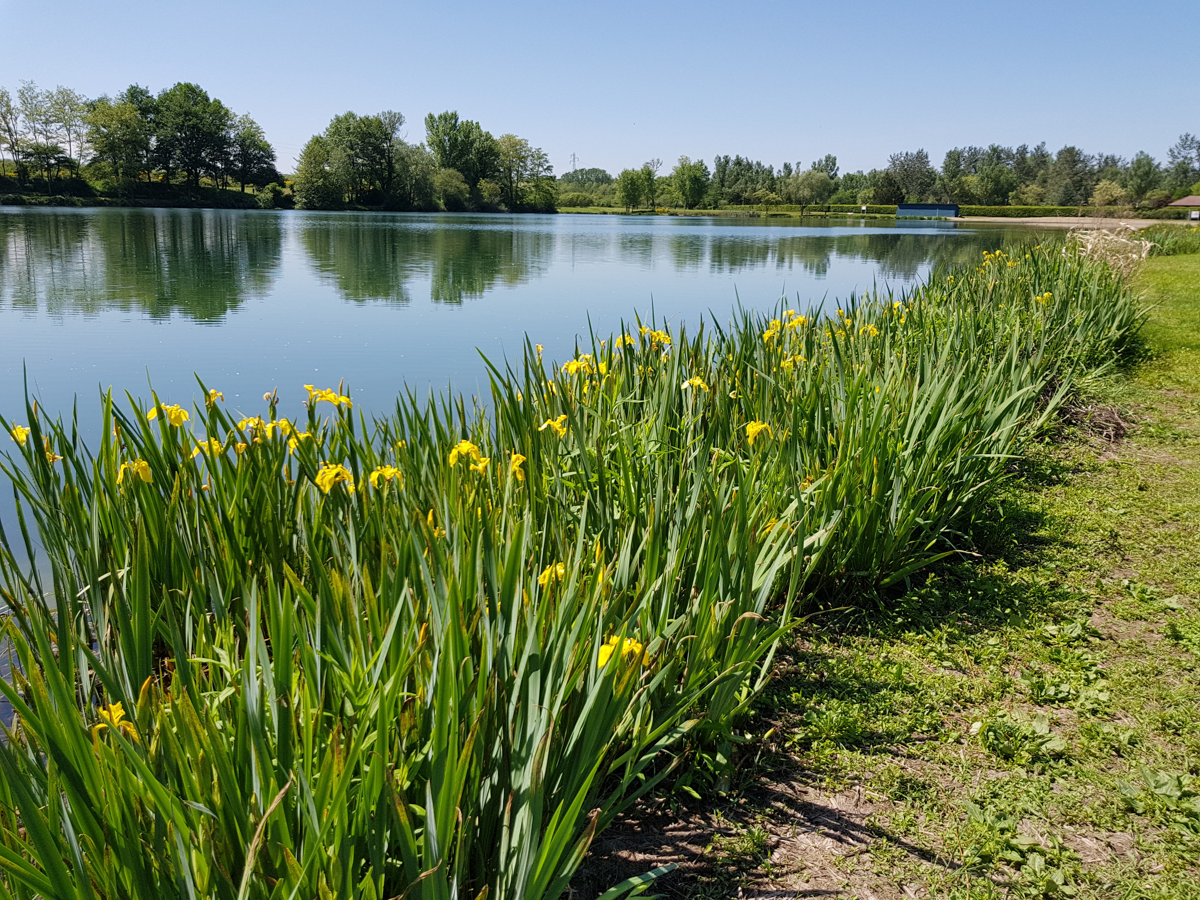 Étang d'ILOAa à Thiers